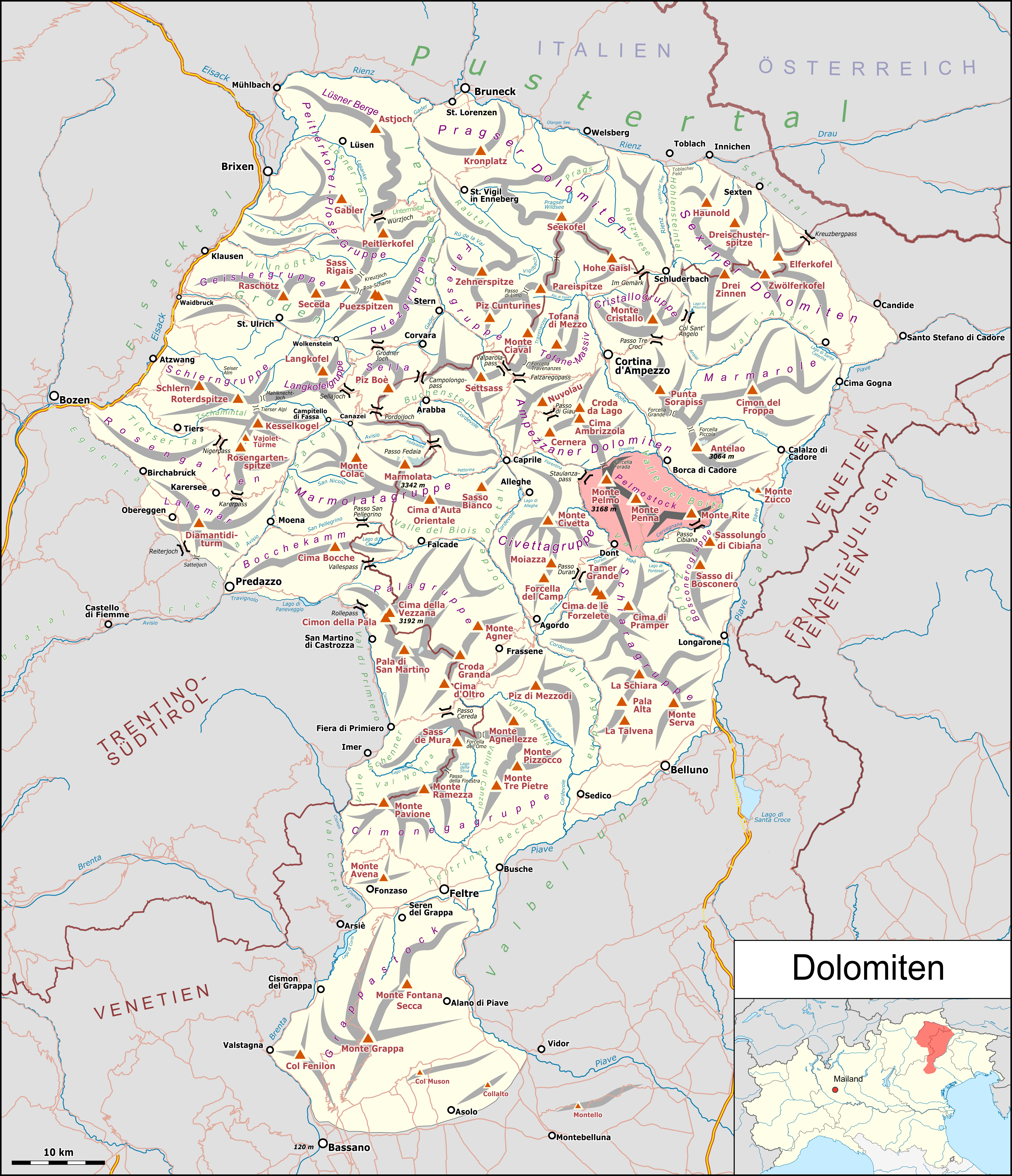 Karte der Dolomiten mit Pelmostock